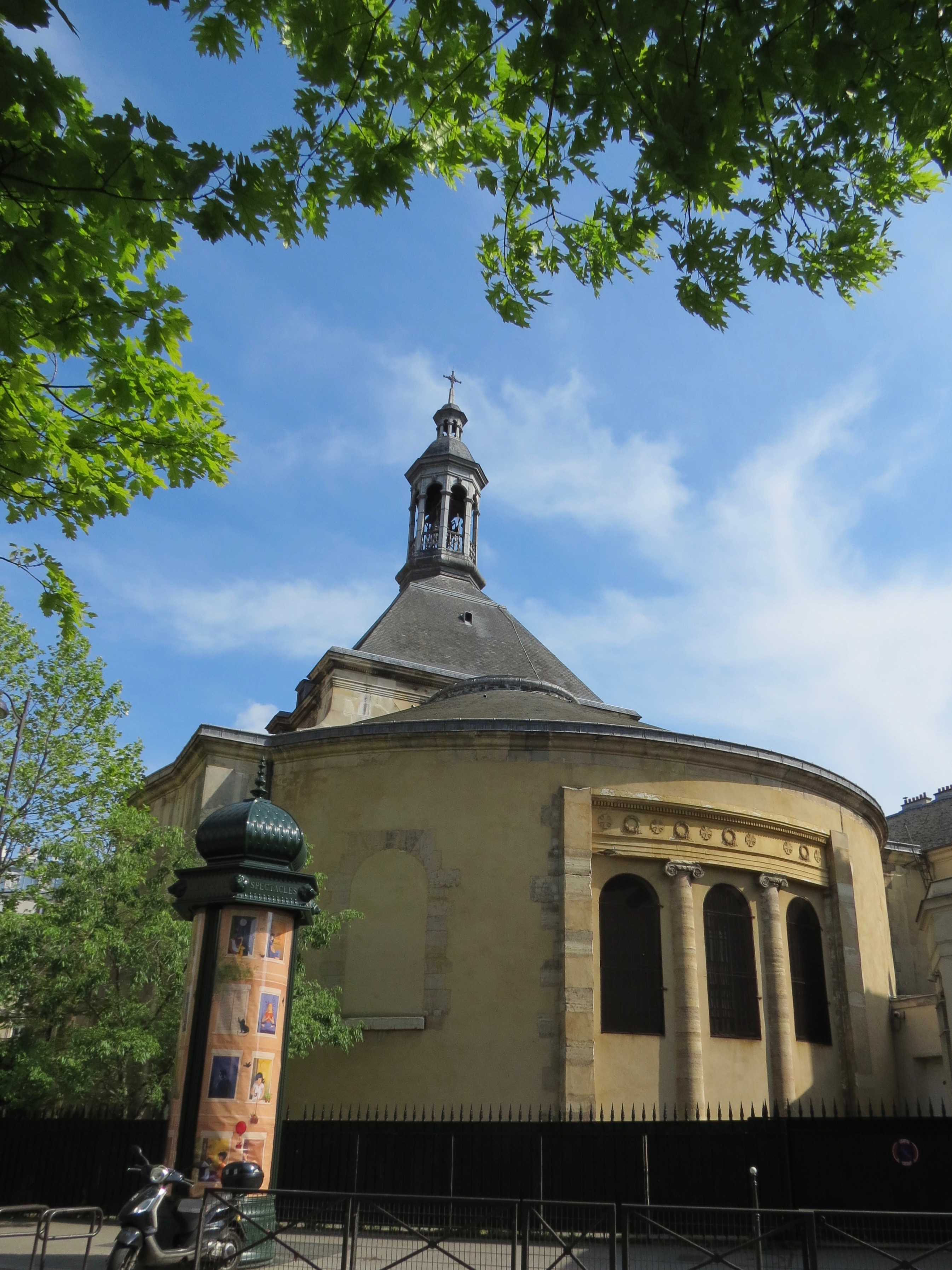 Vue de l'abside de l'église Sainte-Élisabeth de Hongrie depuis la rue de Turbigo.